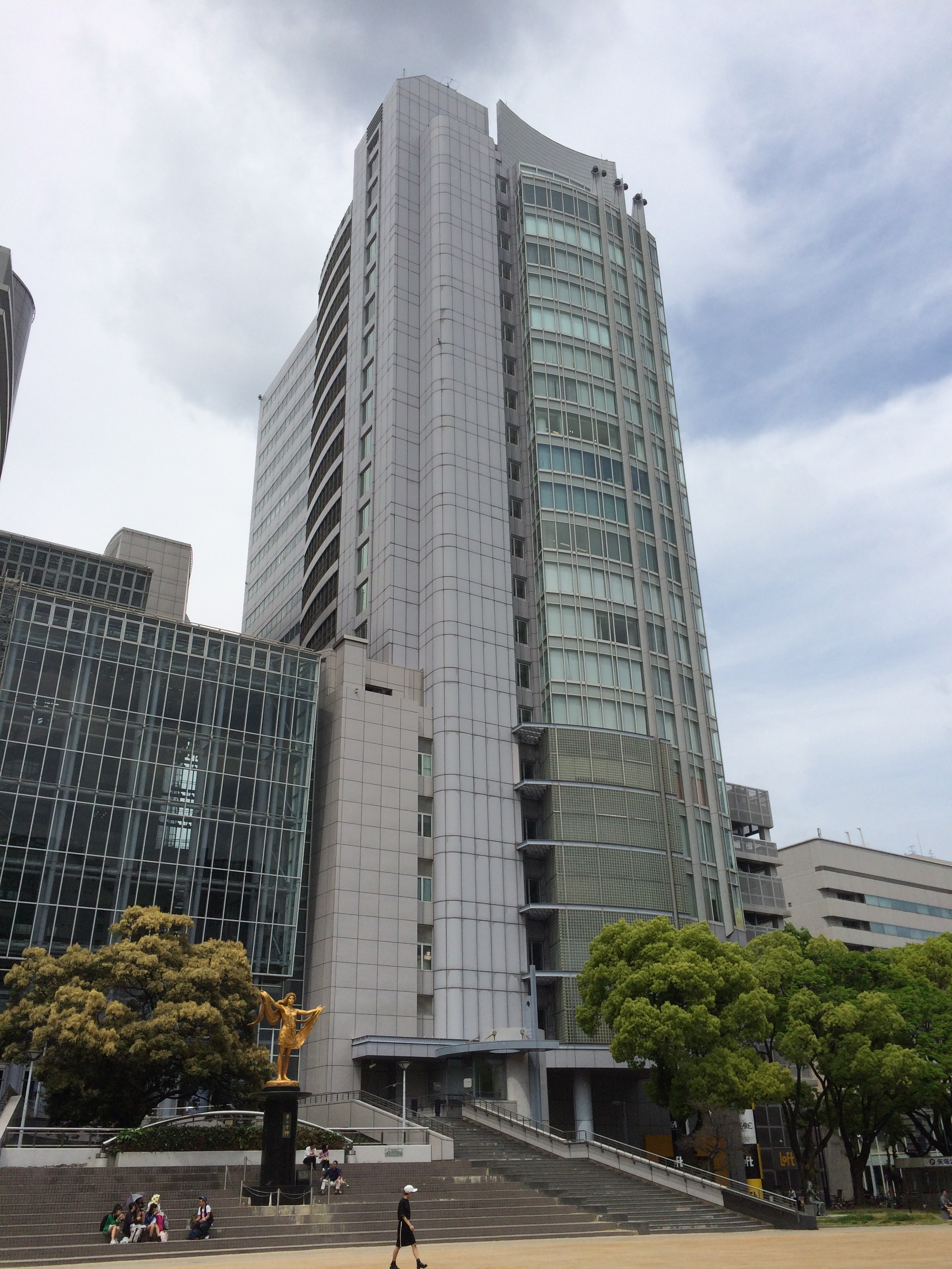 ナディアパーク ビジネスセンタービル